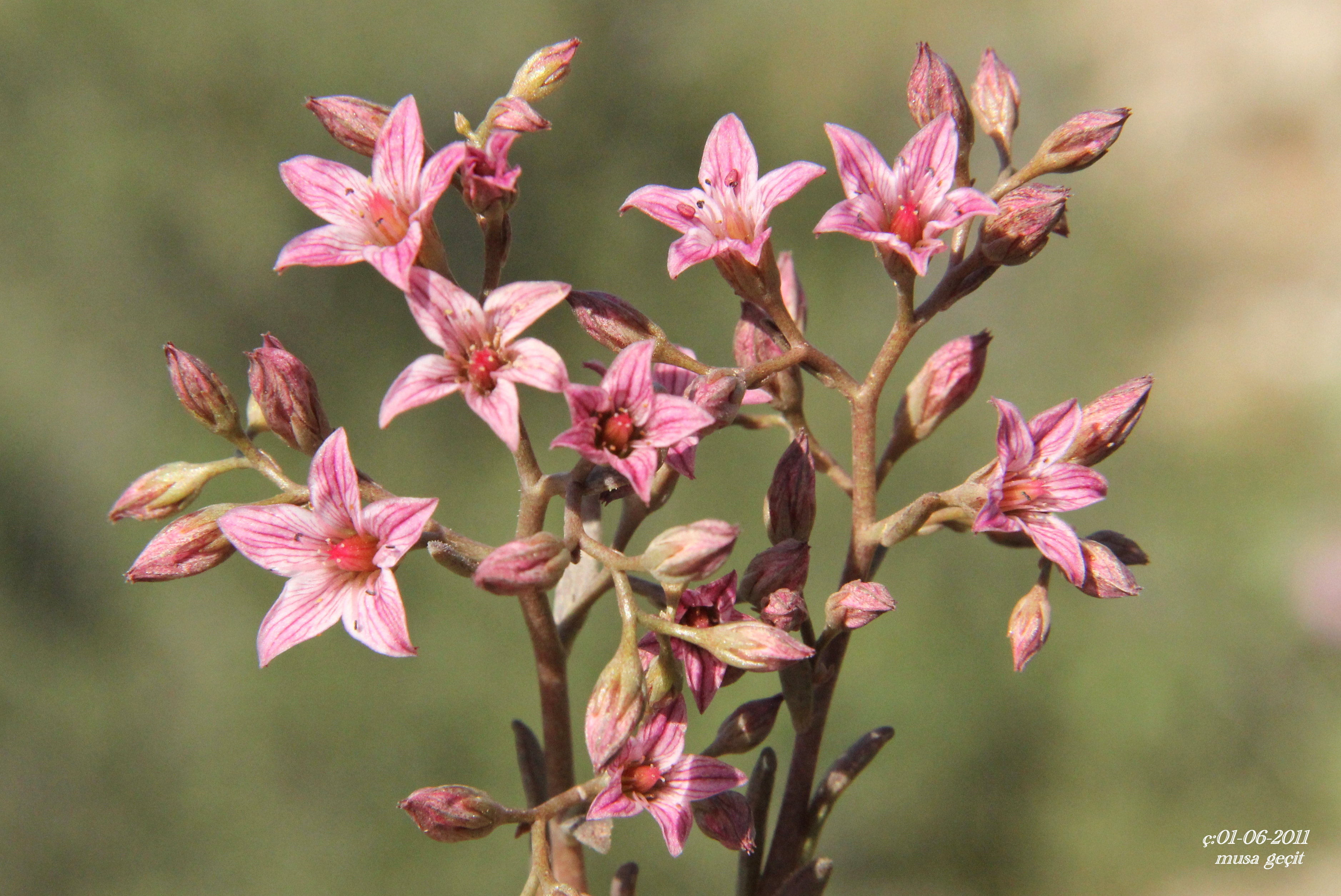 Rosularia sempervivum (M. BIEB.) BERGER subsp. persica (BOISS:) EGGLI